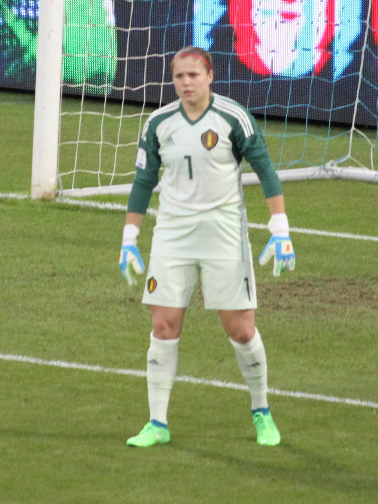 Justien Odeurs, portiere della nazionale di calcio femminile del Belgio: incontro Italia-Belgio del 10 aprile 2018 allo stadio Mazza di Ferrara.